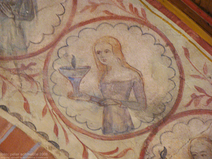 Detail vom Chorbogenfresko in der Totenkirche Neckarbischofsheim